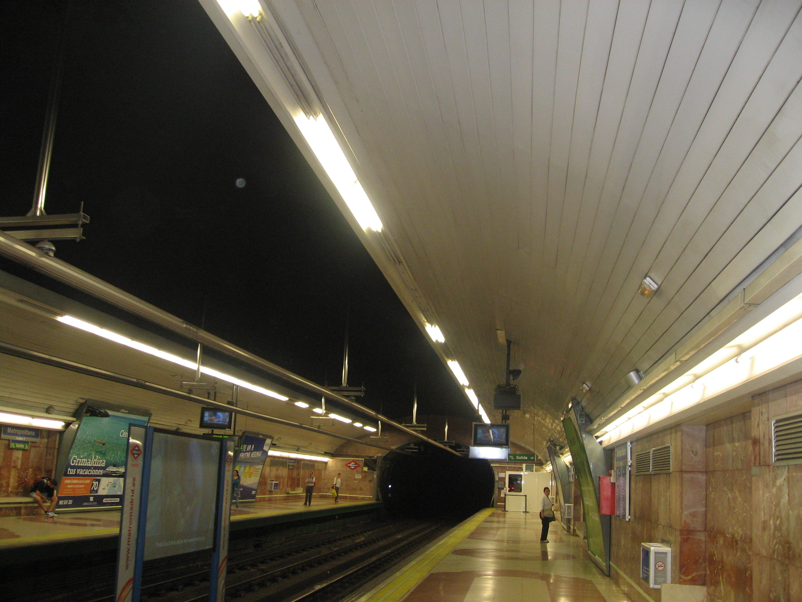 Vista del andén de la estación de Metropolitano.